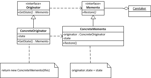 Нестандартный вариант шаблона Memento